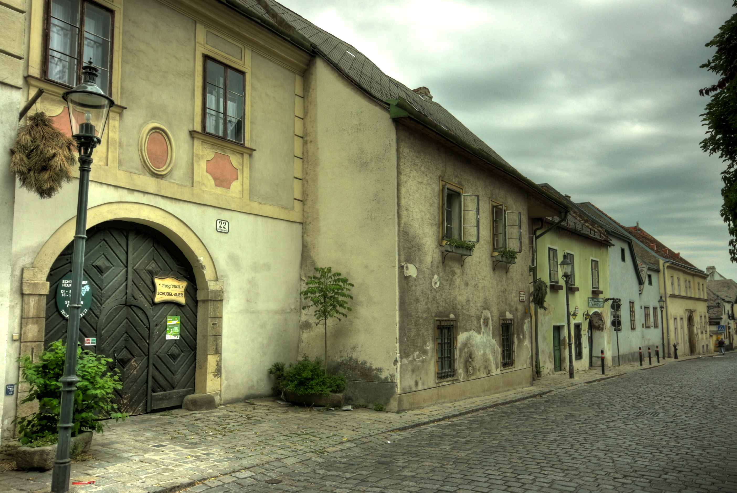 Haeuservielfalt in der Kahlenbergstrasse (Nussdorf)